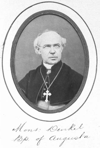 Pankratius Dinkel, Bischof von Augsburg, 1870, I. Vaticanum